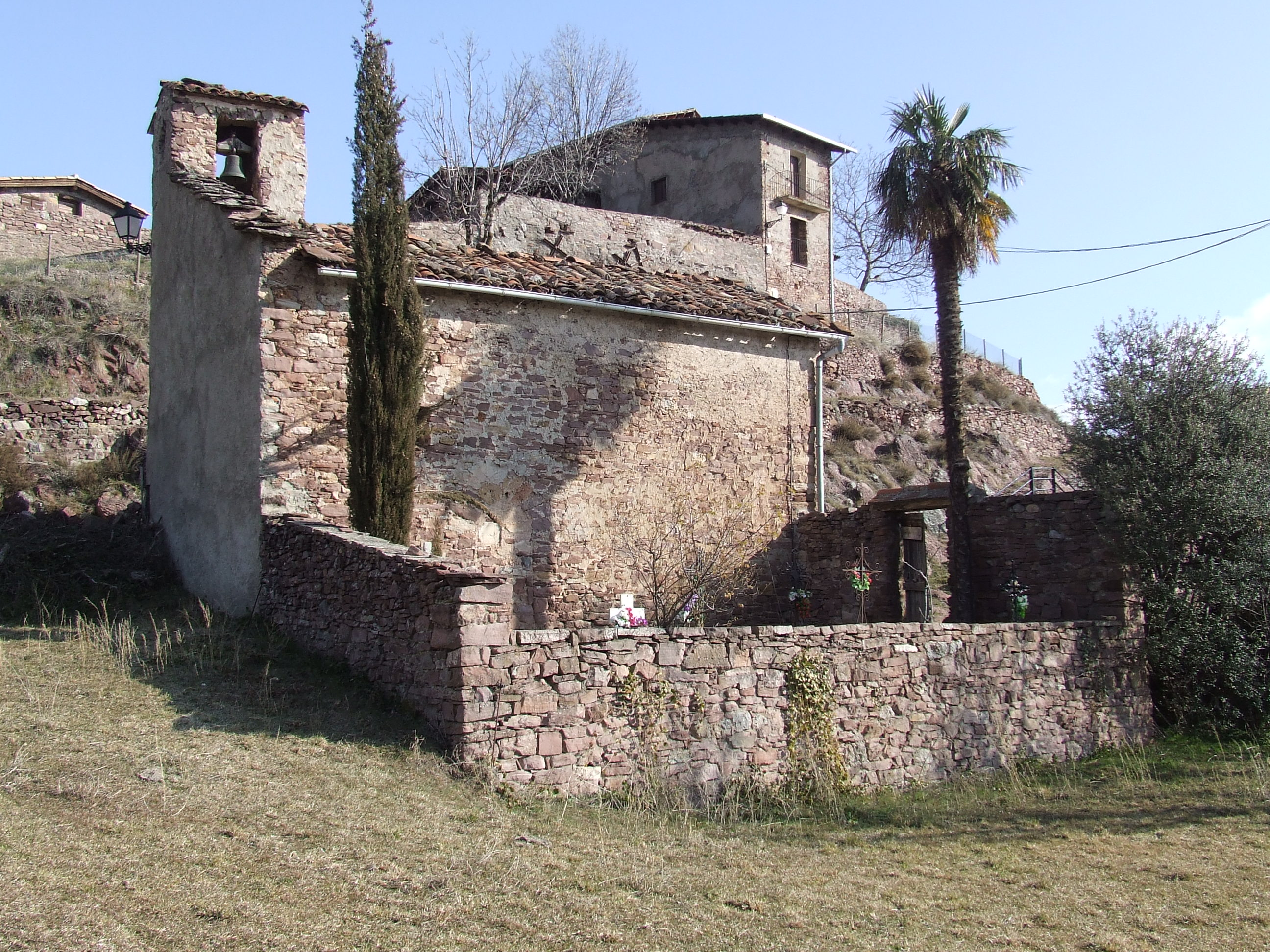 Sant Pere de Castell-estaó (la Pobleta de Bellveí, la Torre de Cabdella, Pallars Jussà)